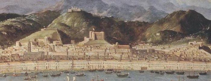 Messina Palazzata Simone Gullì